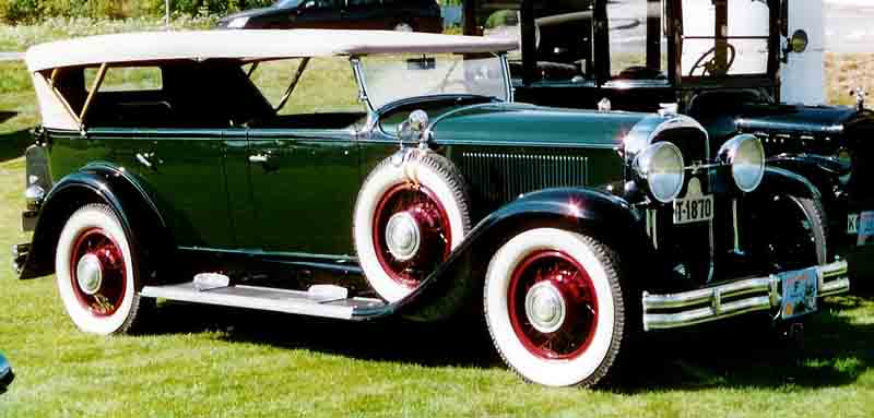 1931 Buick Series 90 Model 95 Phaeton 7-Passenger